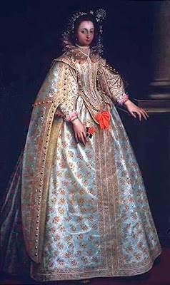 Ritratto di dama della famiglia Capodilista